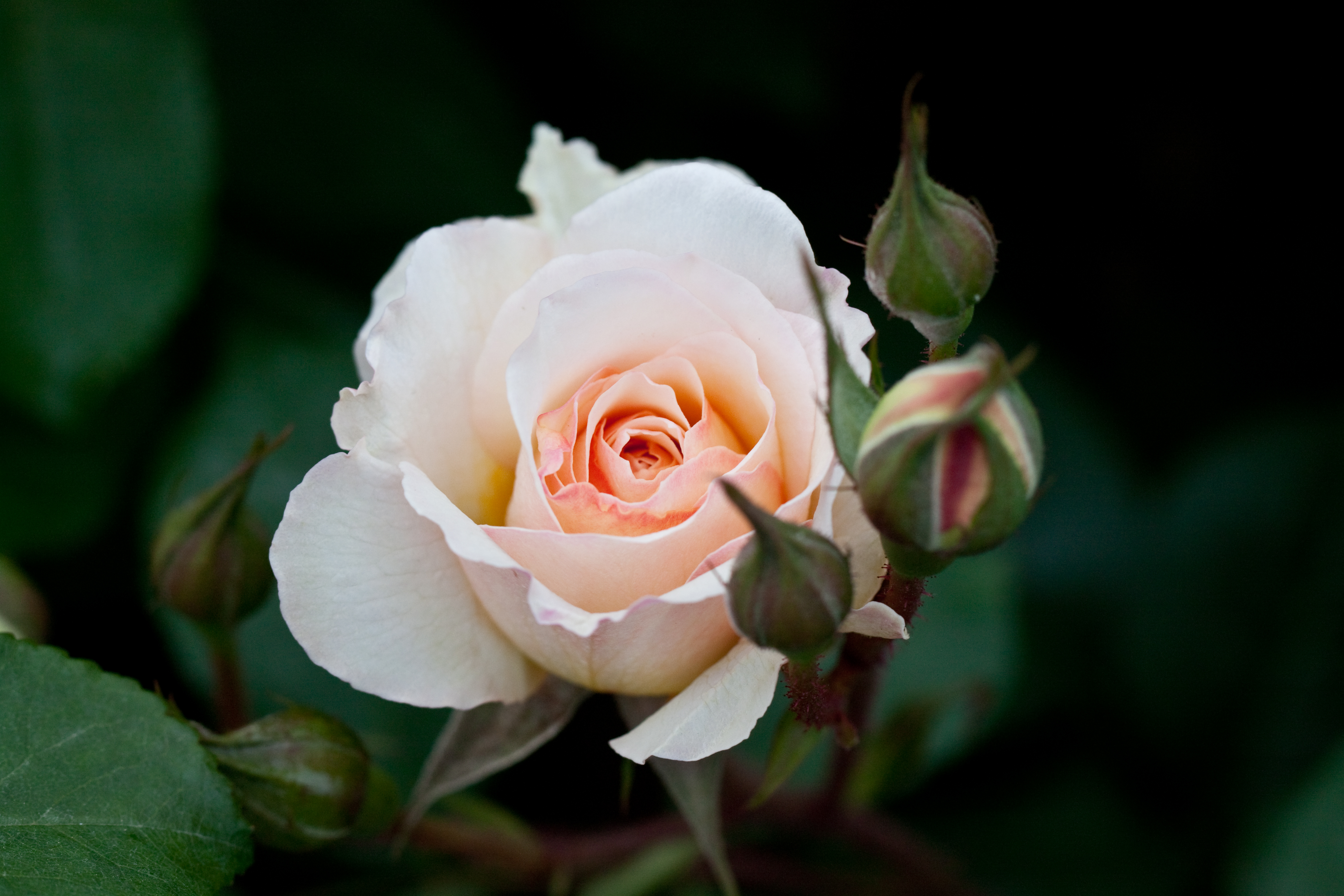 Moonsprite. ムーンスプライト。